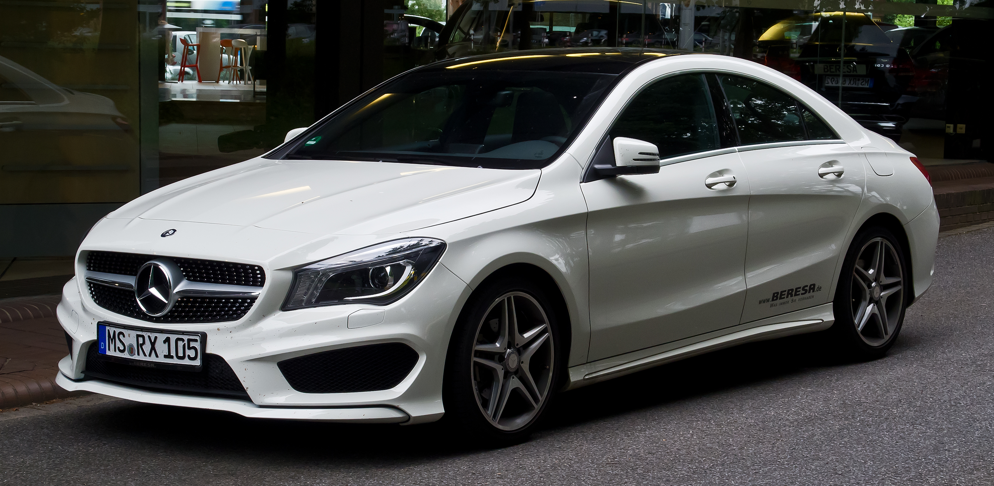 Mercedes-Benz CLA 200 AMG Line (C 117)